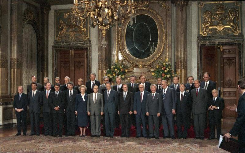 29-30.6.87 Tagung des Europäischen Rates unter Vorsitz des belgischen Ministerpräsidenten Wilfried Martens mit Bundeskanzler Kohl und Bundesminister im Auswärtigen Amt Hans-Dietrich Genscher in Brüssel. 29.6.1987 Familienfoto der Regierungschefs und der Aussenminister anläßlich eines Mittagsessens, gegeben von König Baudouin, im Königspalast.